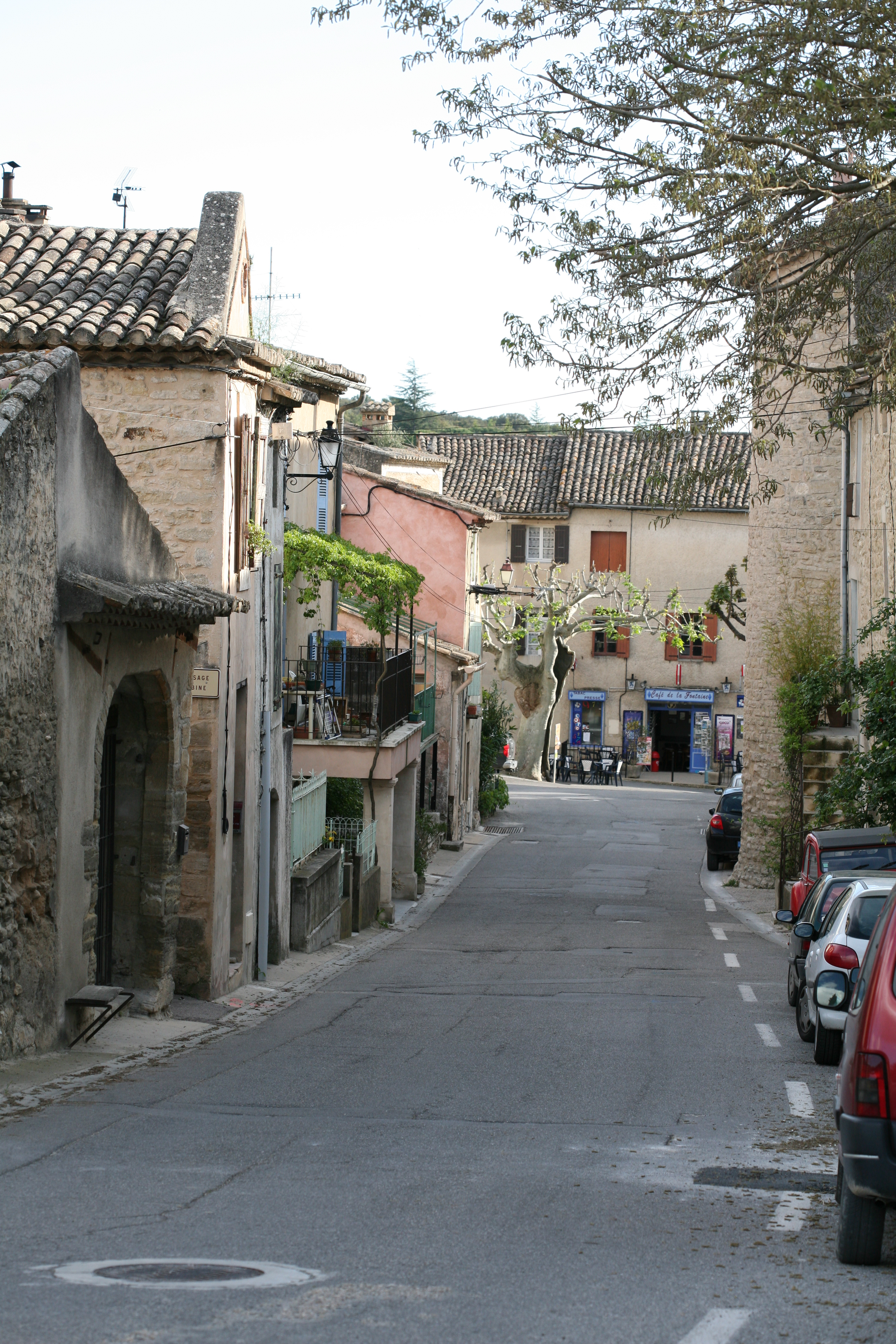 village of Lagnes Vaucluse, France